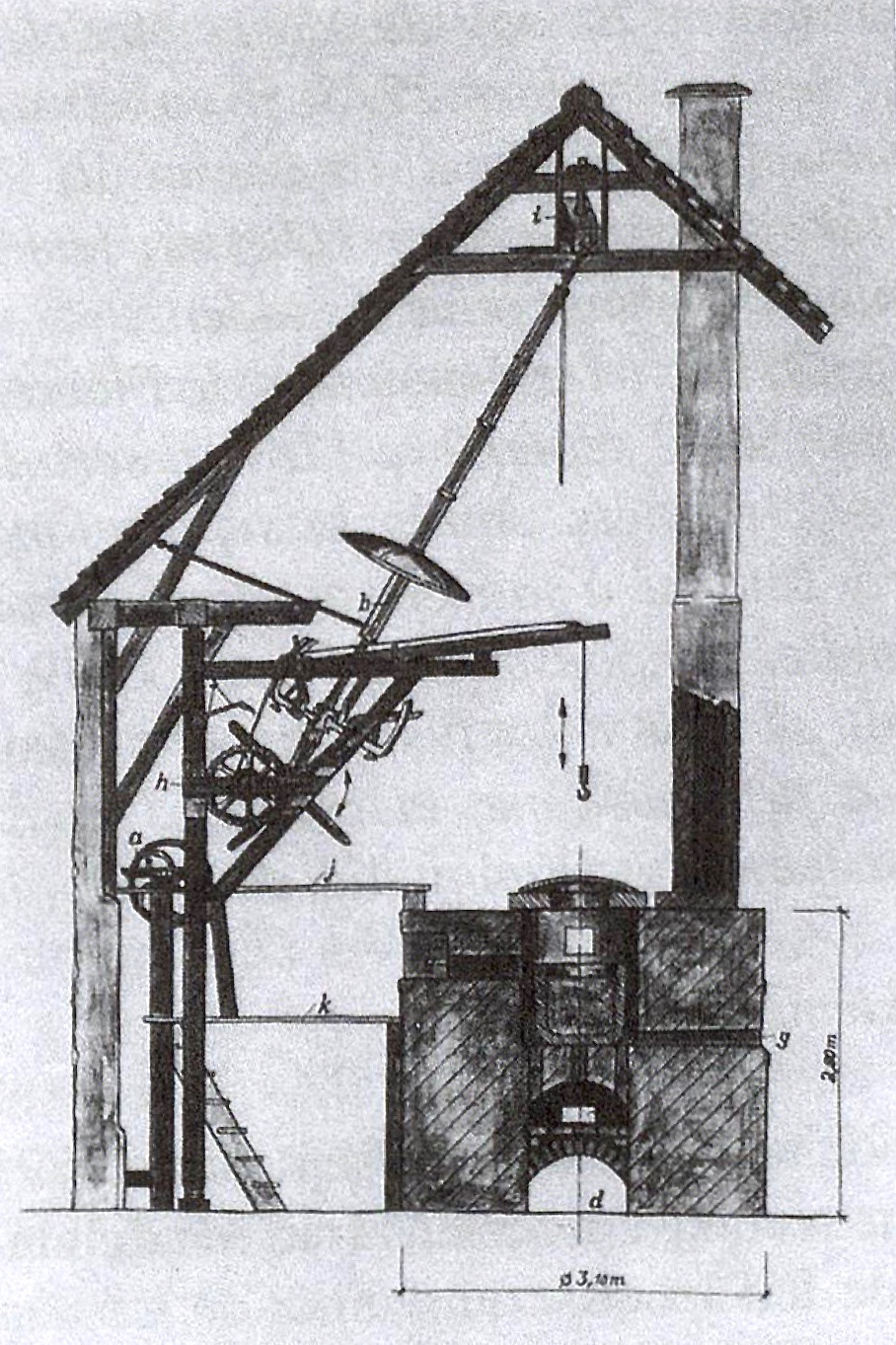 Pierre-Louis Guinand (1748–1824): Zeichnung eines Schmelzofens zur Herstellung von optischem Glas. Privatsammlung, Les Brenets. Aus Pierre-Arnold Borel: Branche de Pierre Louis Guinand 1748-1824, le célèbre opticien, communier des Brenets et des Ponts-de-Martel, bourgeois de Valangin. In: Familienforschung Schweiz, Jahrbuch 2002, S. 162–171, hier: S. 165.